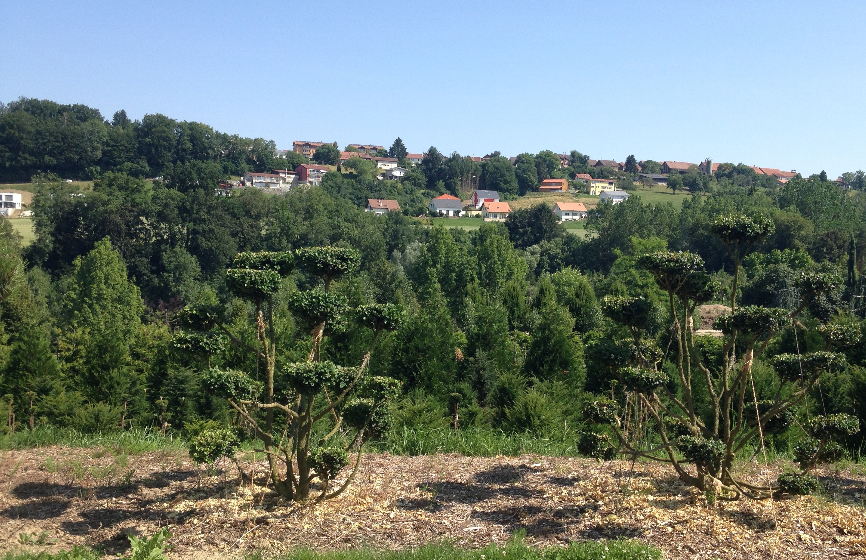 Le village de Seiry, dans la commune fribourgeoise de Lully en Suisse, vu de Bollion